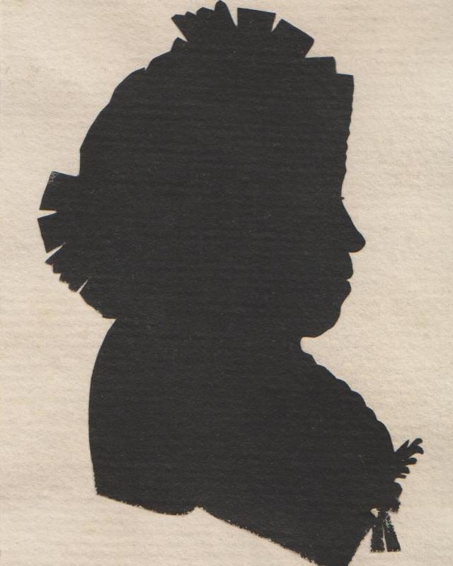 Elisabeth Christiane Magdalene Gebser (1746-1818) geboren in Nordhausen, spätere Frau von Ludwig Bernhard Schneidewind (1735-1790) in Heringen/Helme und Tochter von Gustav Friedrich Gebser (1694-1766), Kurfürstlich Sächsischer Amtmann zu Sittenbach.